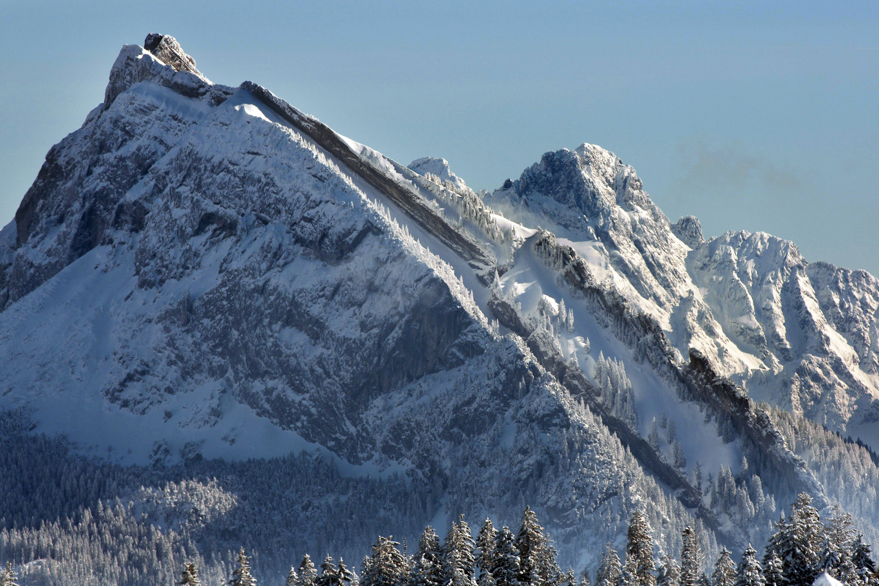 Der Chöpfenberg (Schwyz / Glarus) im Winter